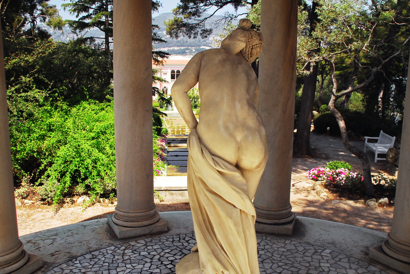 Villa Ephrussi de Rothschild - Temple of Love